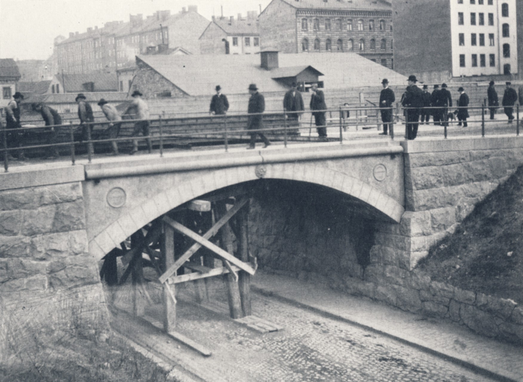 Sveabron i Stockholm, byggd av Skånska Cementgjuteriet